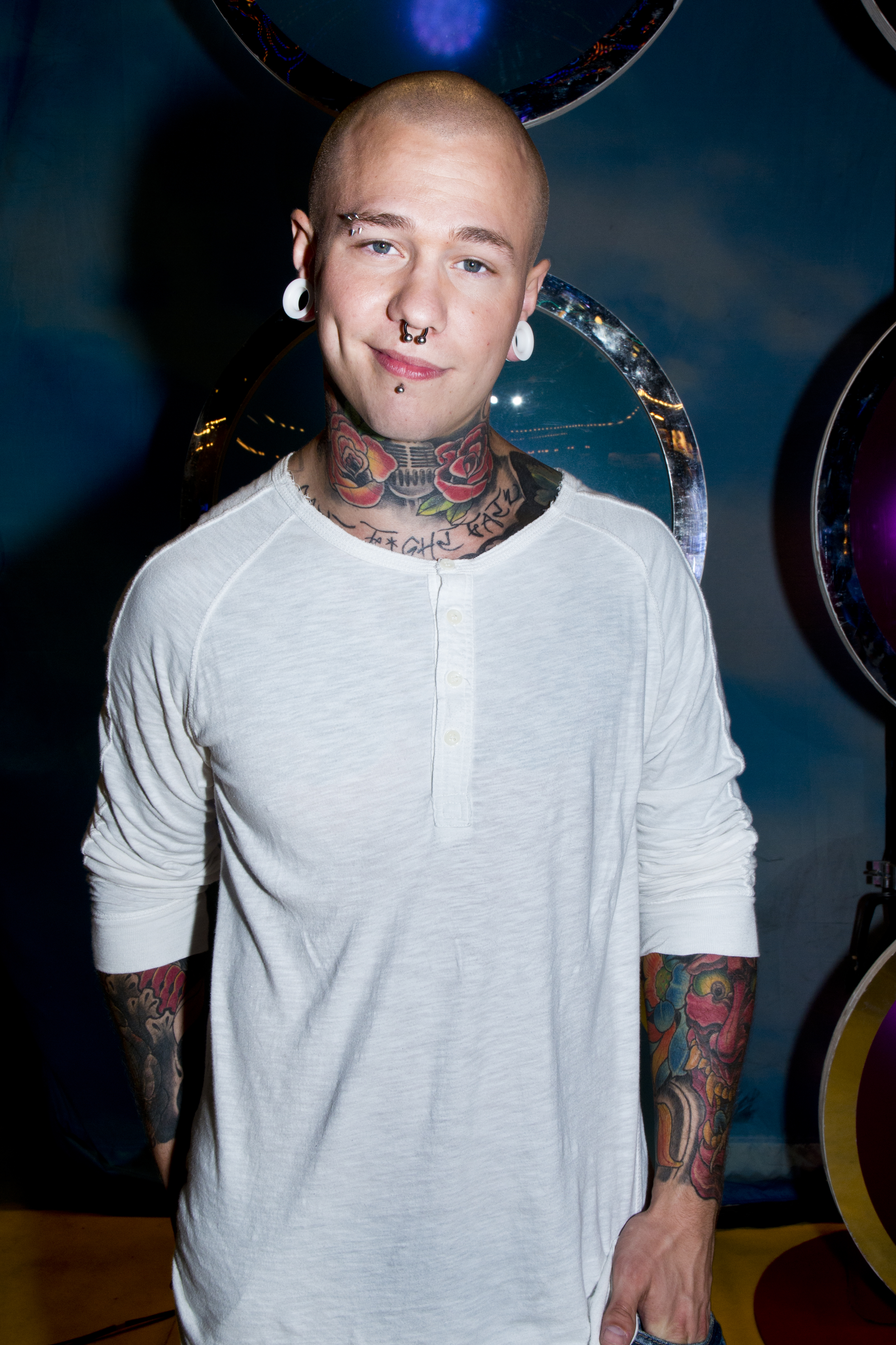 Linus Svenning på Sommarkrysset 2014